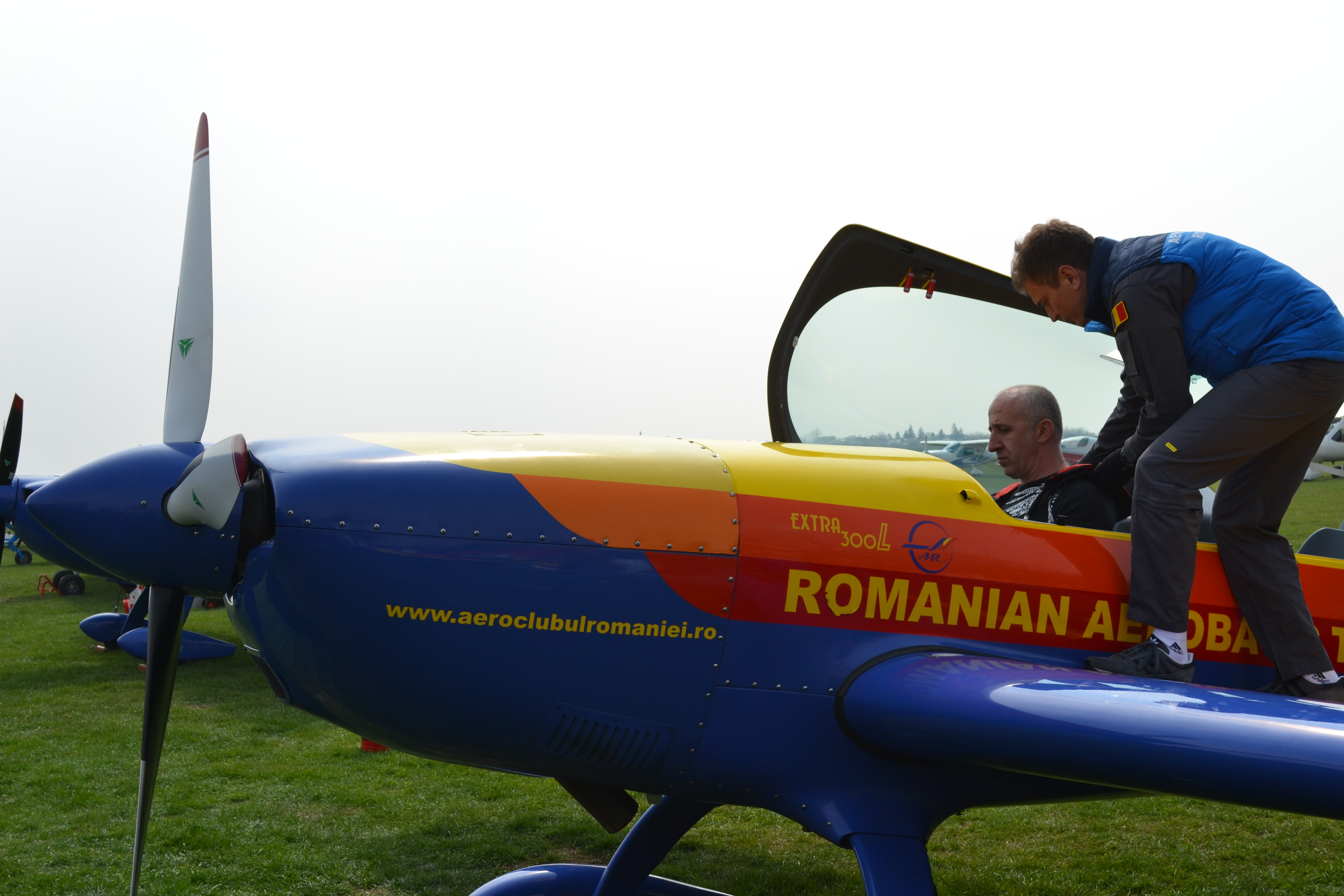 Onorat să zbor cu Hawks of Romania, vice-campioni europeni la acrobație